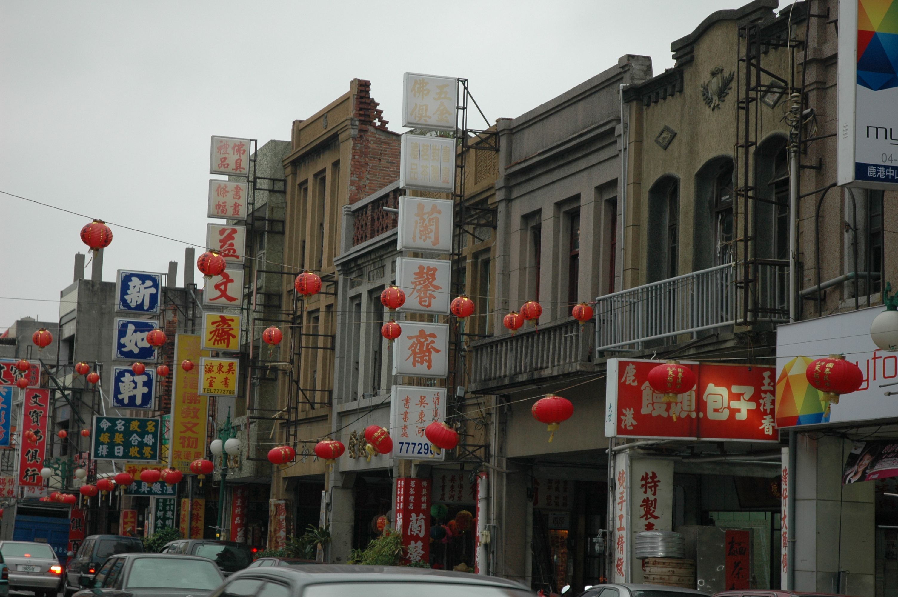 鹿港老街08